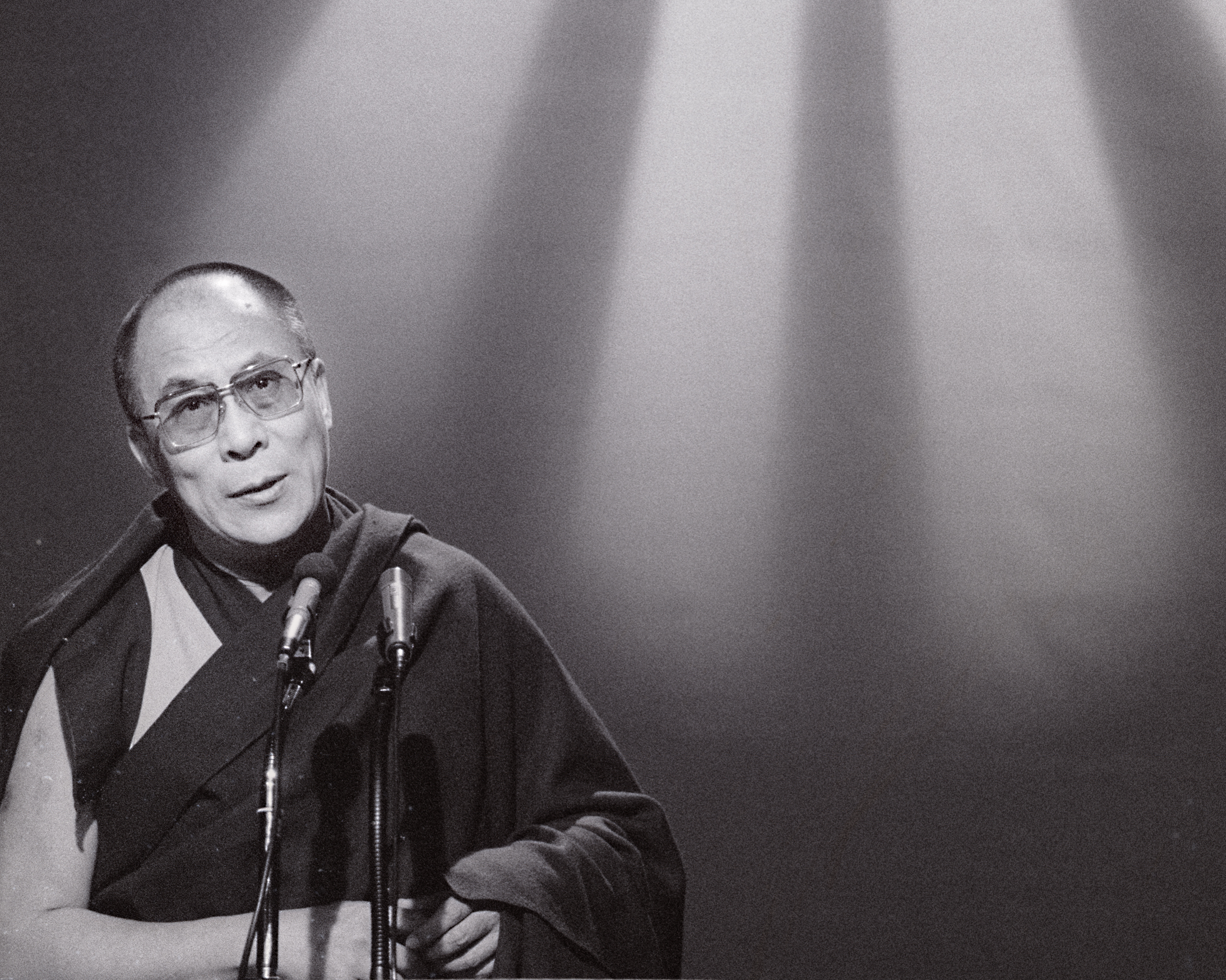 Den 14. Dalai Lama besøkte Sametinget og Karasjok i 1989 i forbindelse med sitt besøk i Norge i forbindelse med at han vant Nobels fredspris. Foto: Harry johansen.